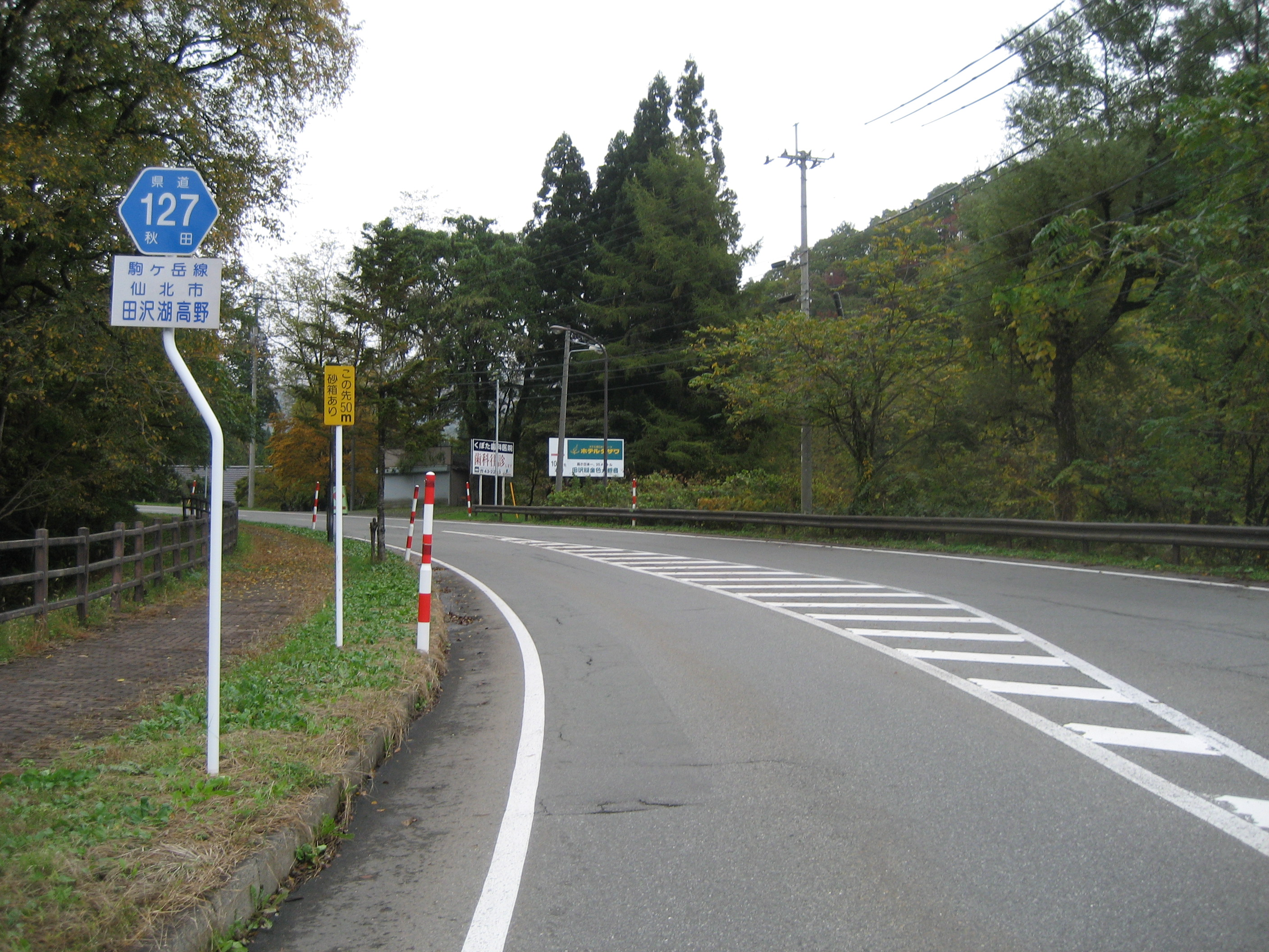 秋田県道127号線仙北市田沢湖高野付近